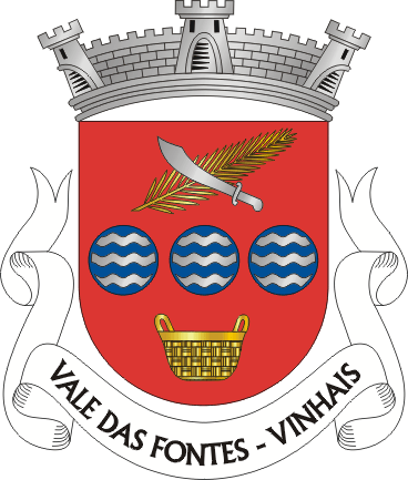 brasão val das fontes portugal